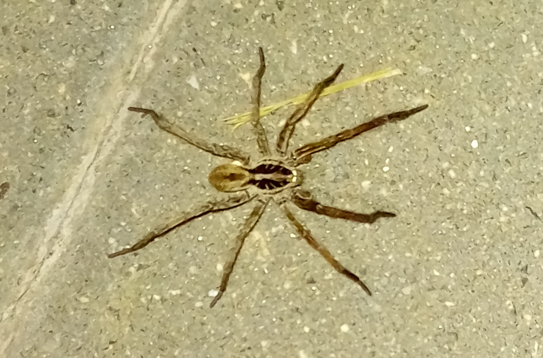 Una araña-lobo "Hogna radiata" por el barrio de Sanchinarro (Madrid).